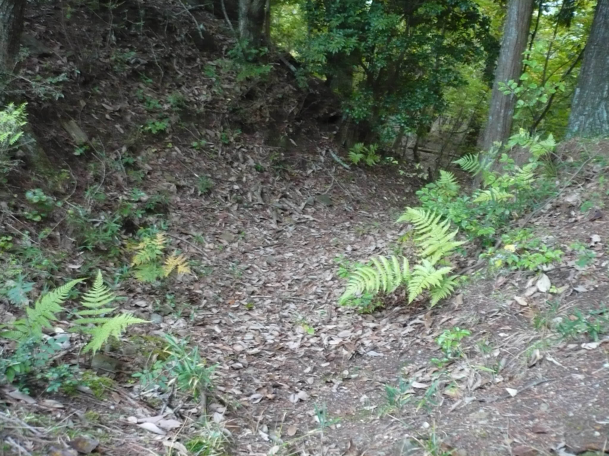 本丸